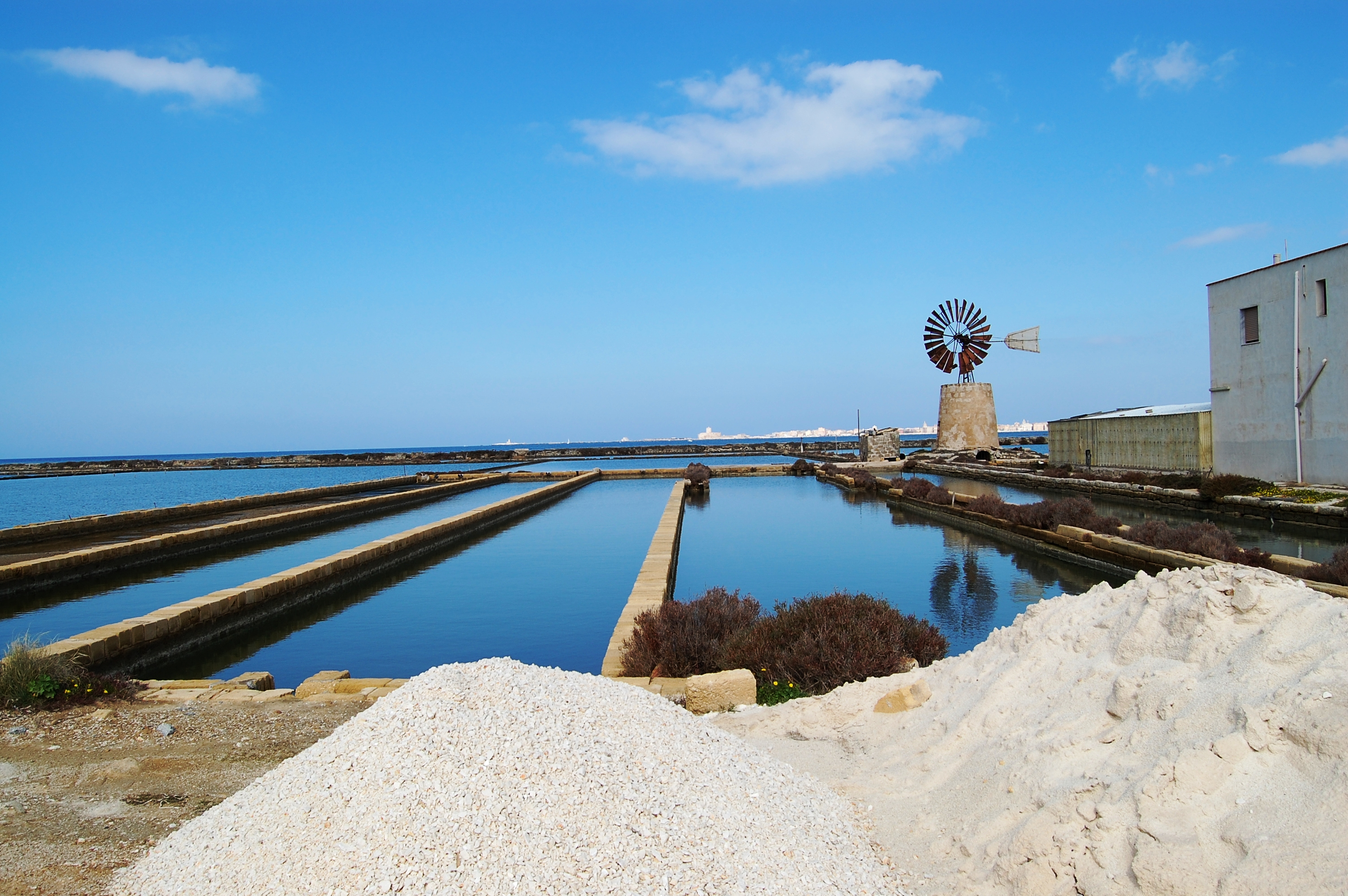 Riserva naturale Saline di Trapani, Sicily